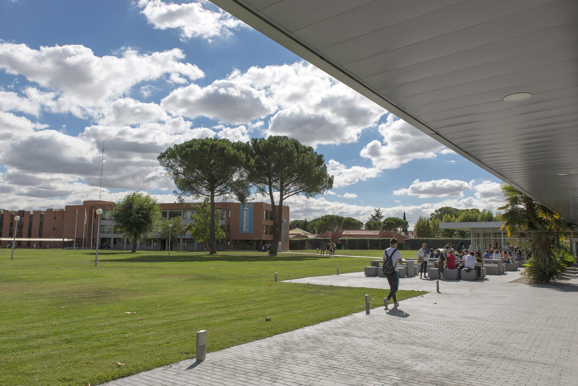 Universidad Camilo José Cela